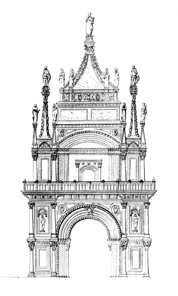 Incisione tratta da: "Il Palazzo Ducale di Venezia illustrato da Francesco Zanotto, con incisioni, Venezia 1841"